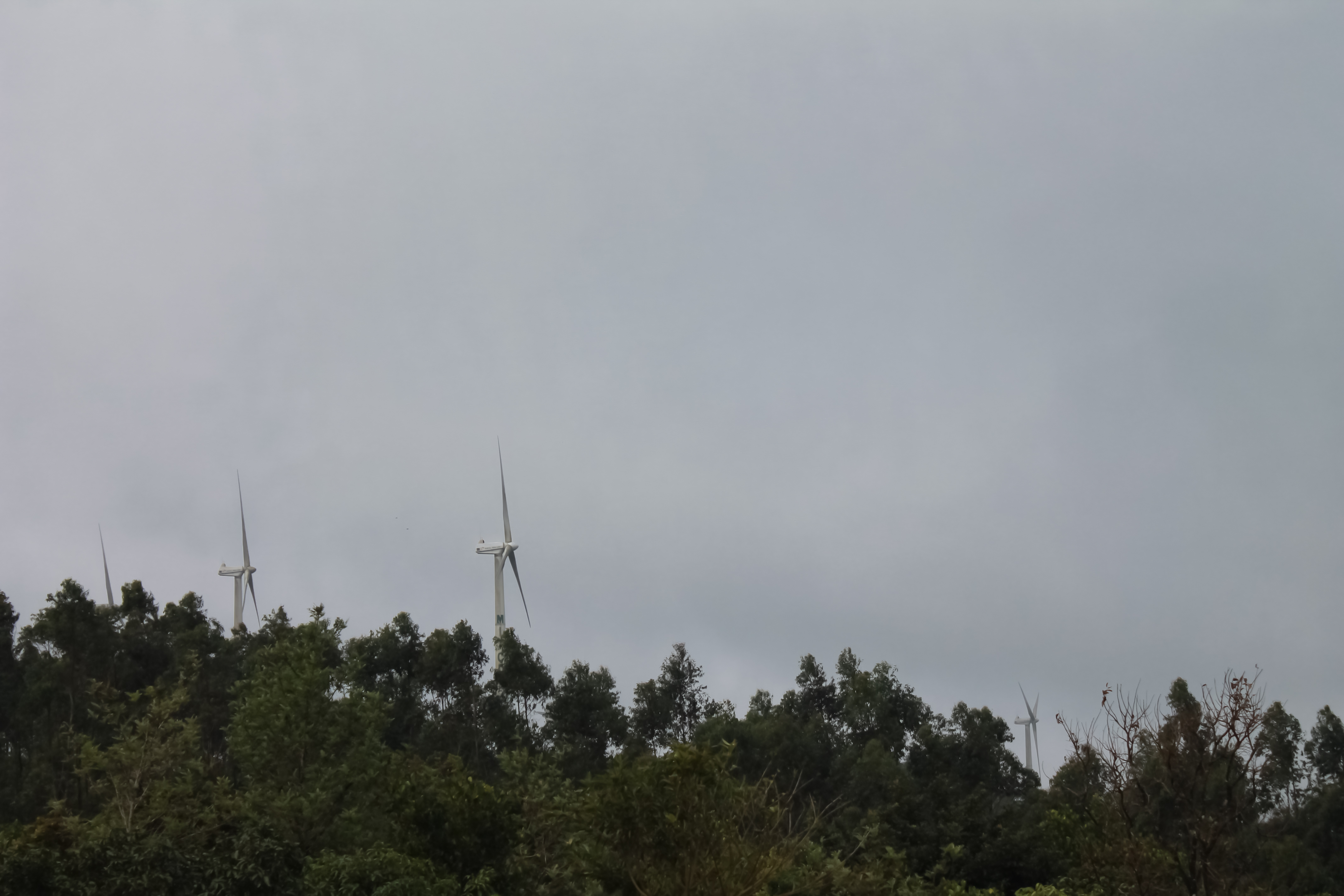 ഇടുക്കിയിൽ രാമക്കൽമേടിനടുത്തുള്ള കാറ്റാടിപ്പാടം എന്ന സ്ഥലത്തെ കാറ്റാടിയന്ത്രങ്ങൾ